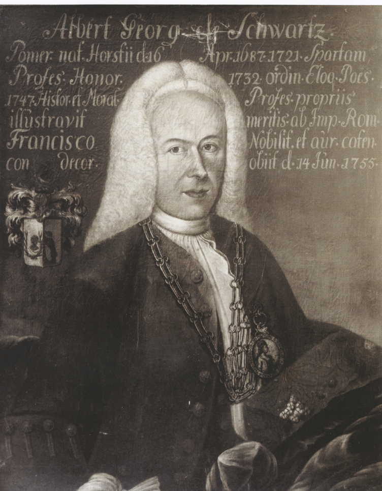 Bild Albert Georg Schwartz (1687-1755)